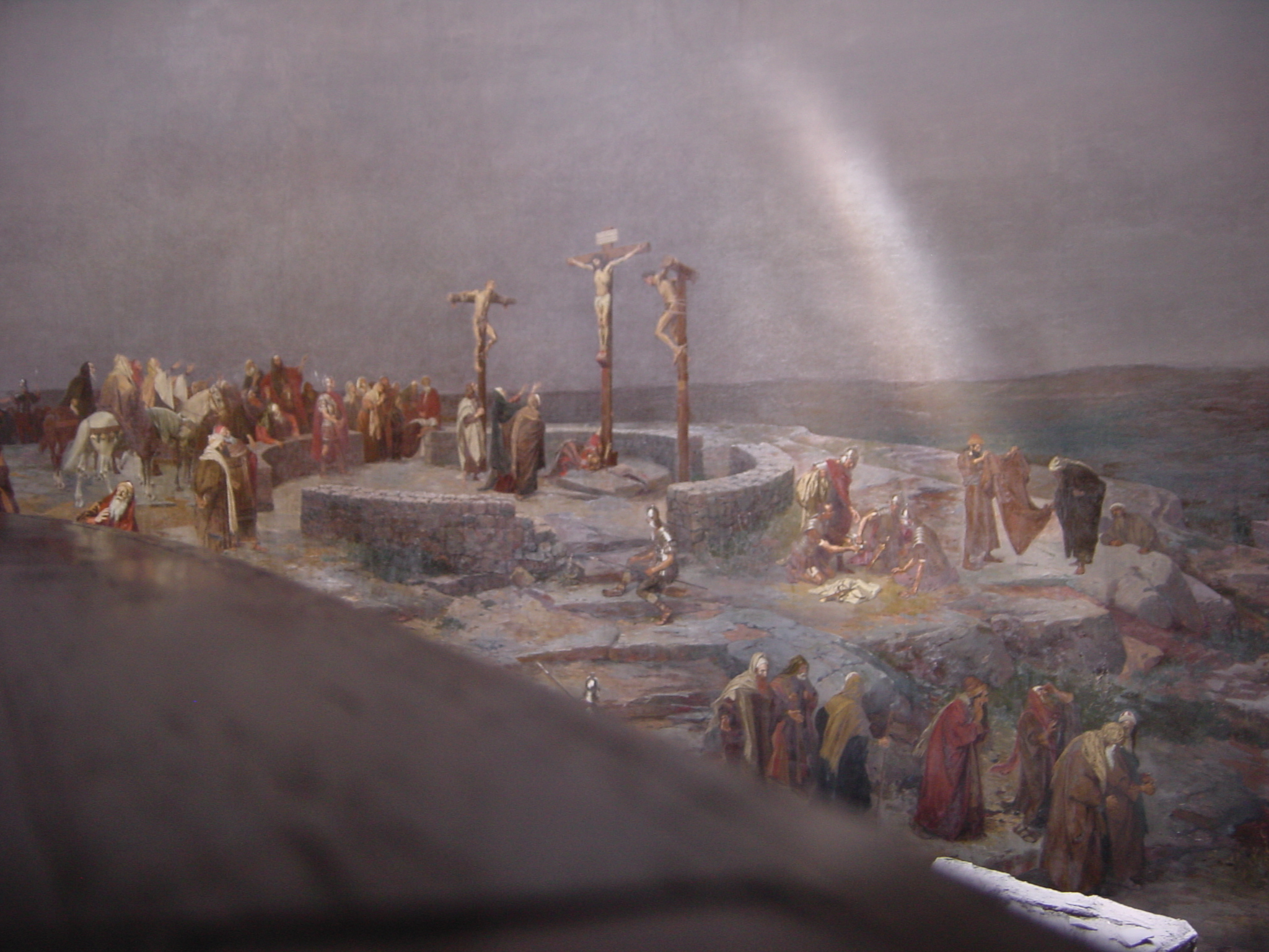 Altötting, Panorama Kreuzigung Christi von Gebhard Fugel, Detail